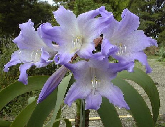 Worsleya rayneri en fleur